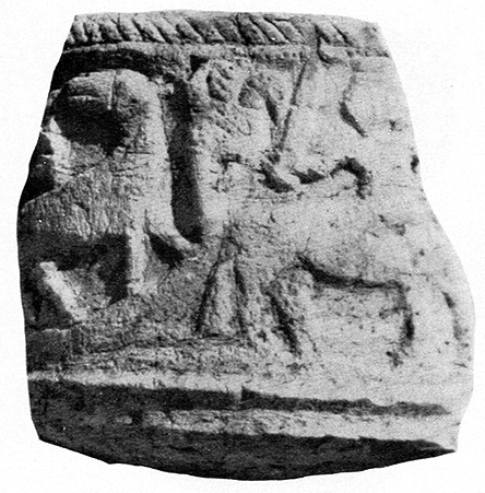 Dalums kyrka. Fragment av dopfunt